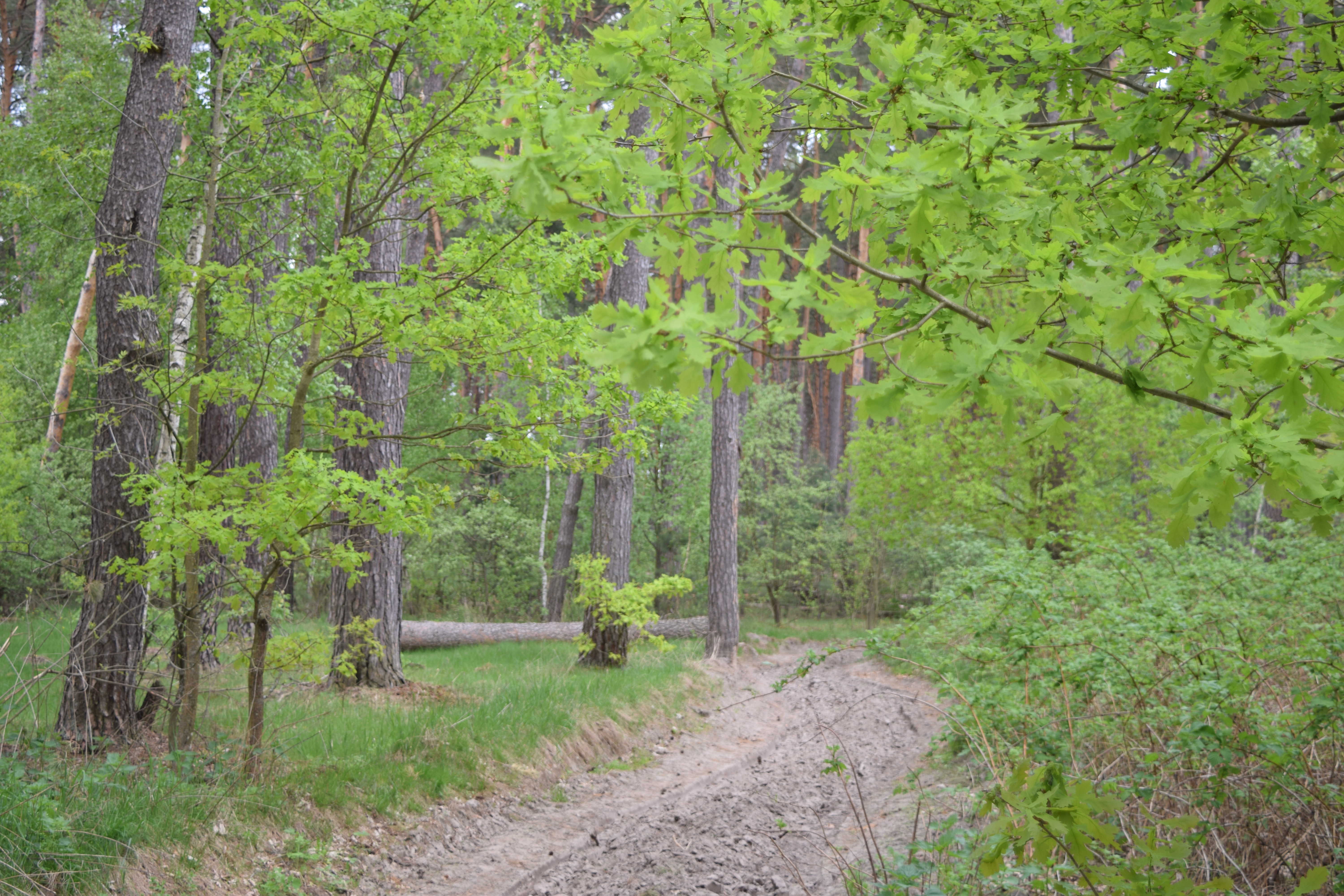 Карыжский заказник, Глушковский район This image is related to the protected area of Russia number 4610005